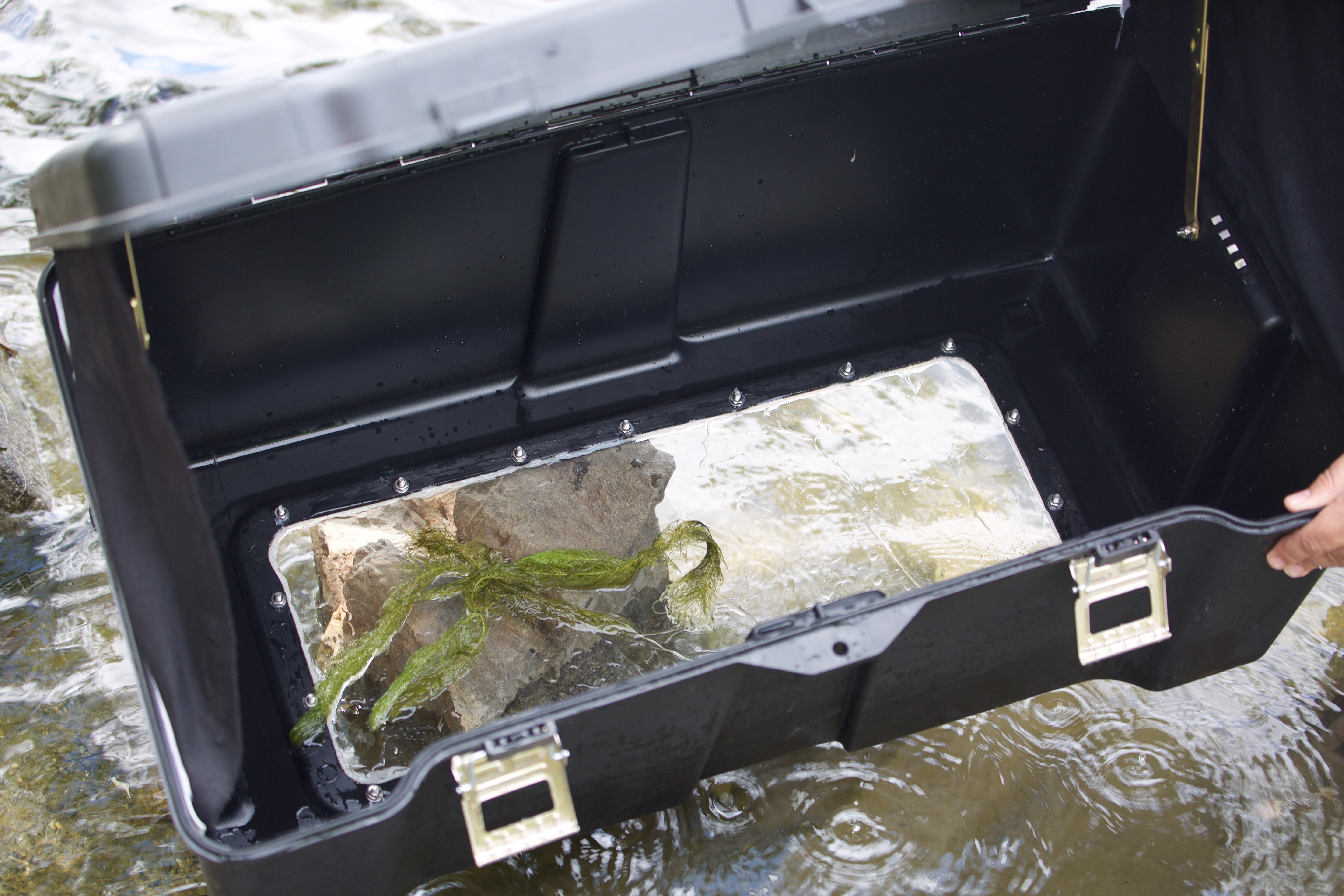 4G7A9342